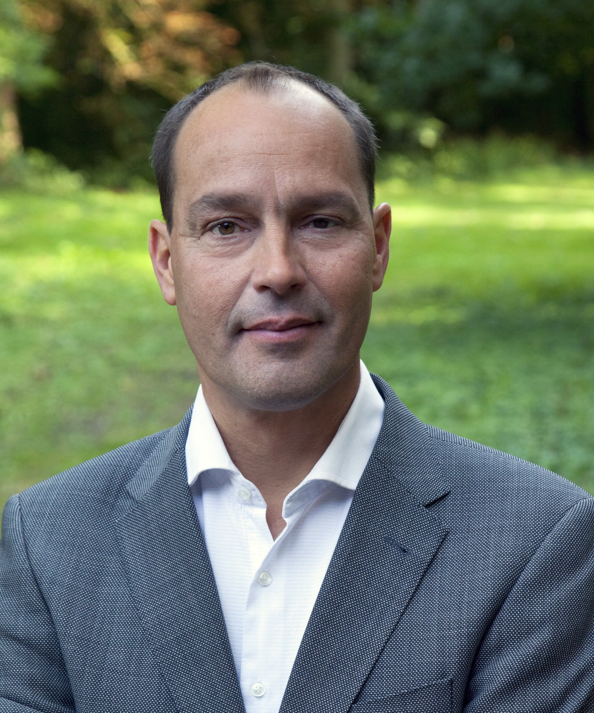 Bruno Braakhuis